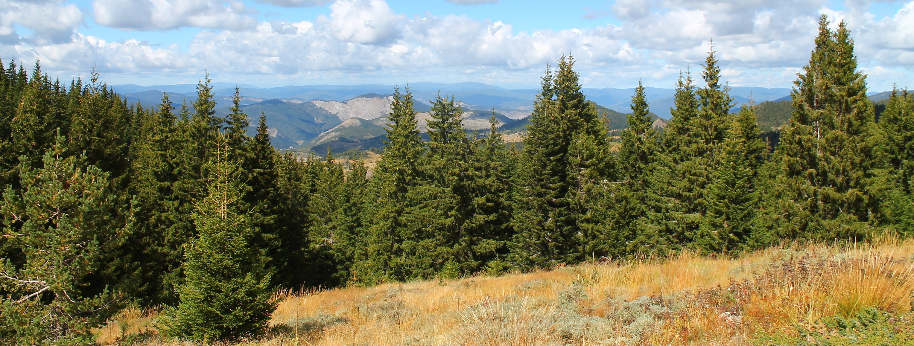 Родопите